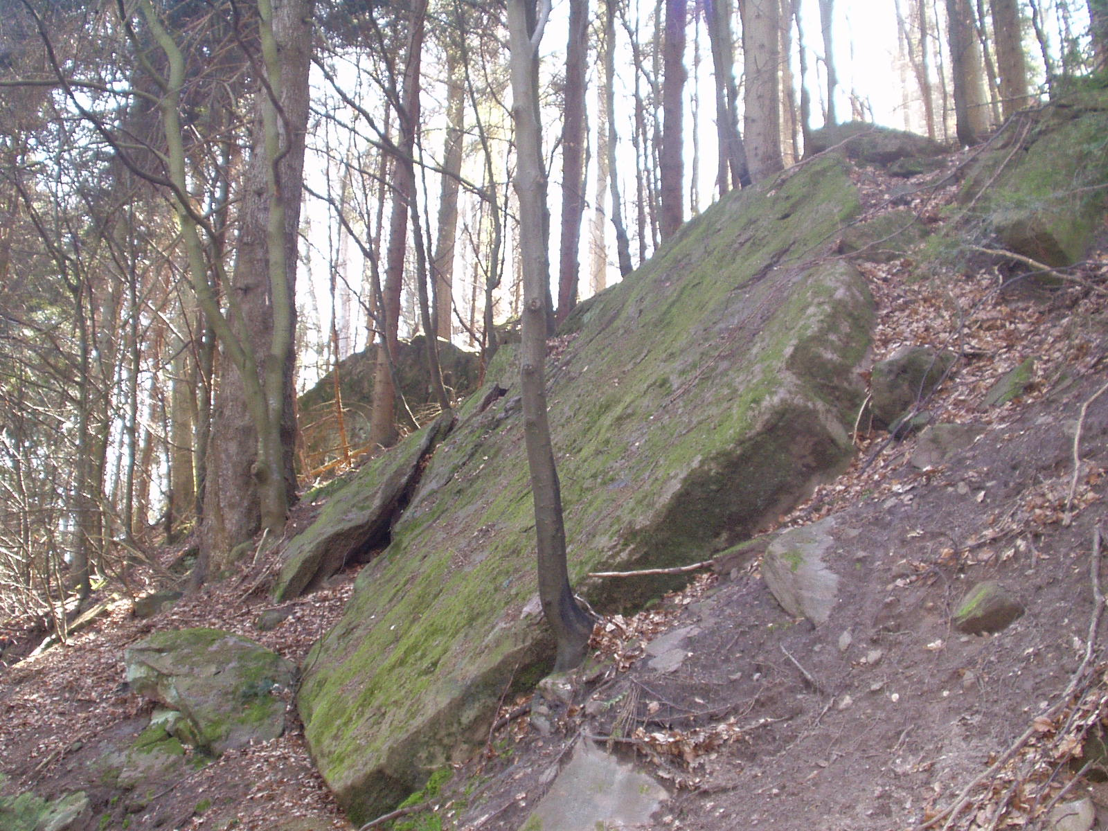 Angelstein, Naturdenkmal in Neuenbürg, Enzkreis